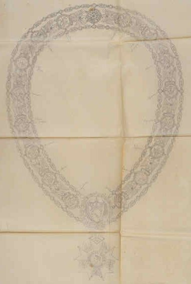 Grand collier de la Légion d'Honneur (calque de Martin-Guillaume Biennais pour Jean-Jacques-Régis de Cambacérès)